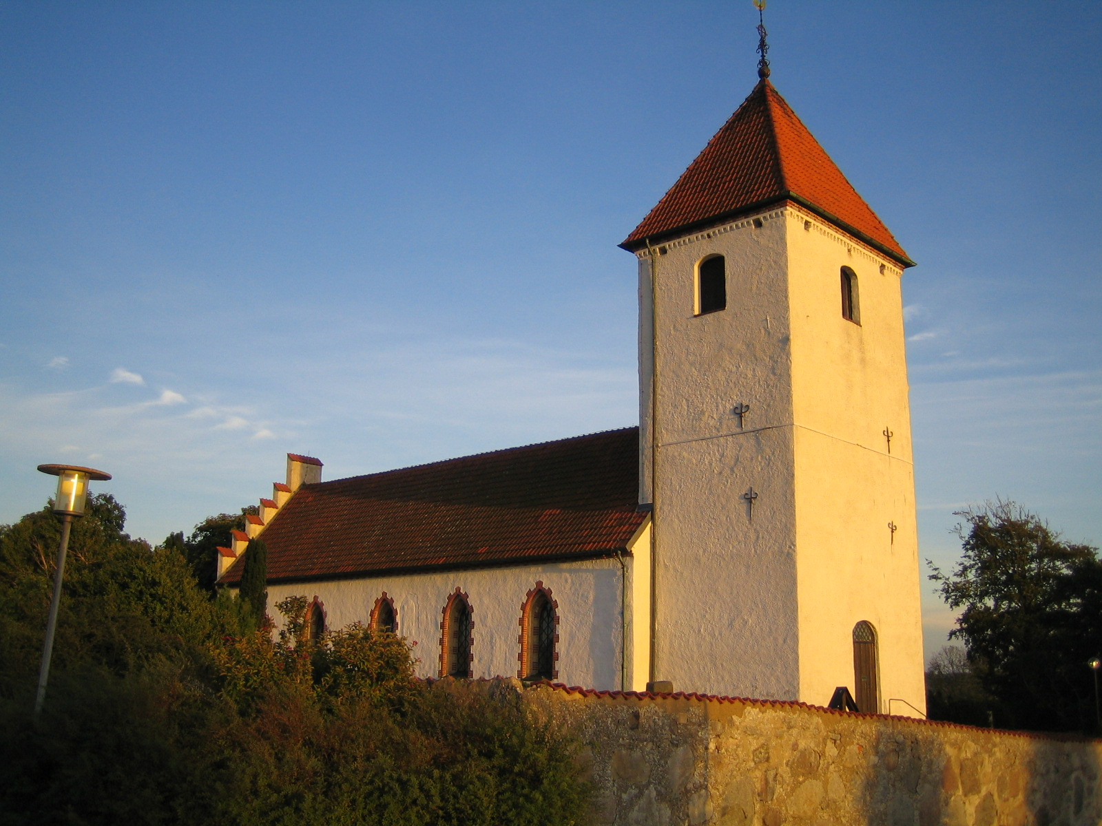 Bara kyrka